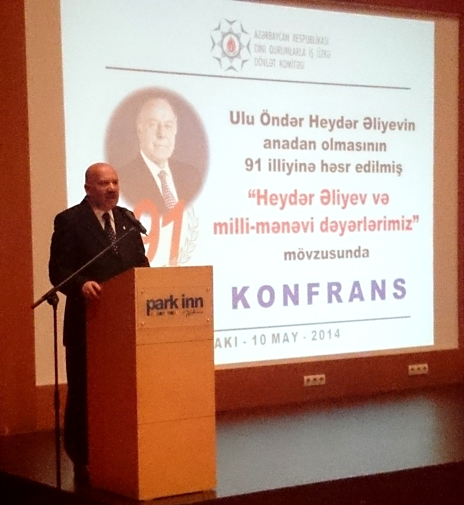 Səyyad Aran DQİDK-nın konfransında